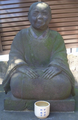 Amazake-baba, Nichirin-ji, Tokyo (東京都文京区・日輪寺の甘酒婆像)